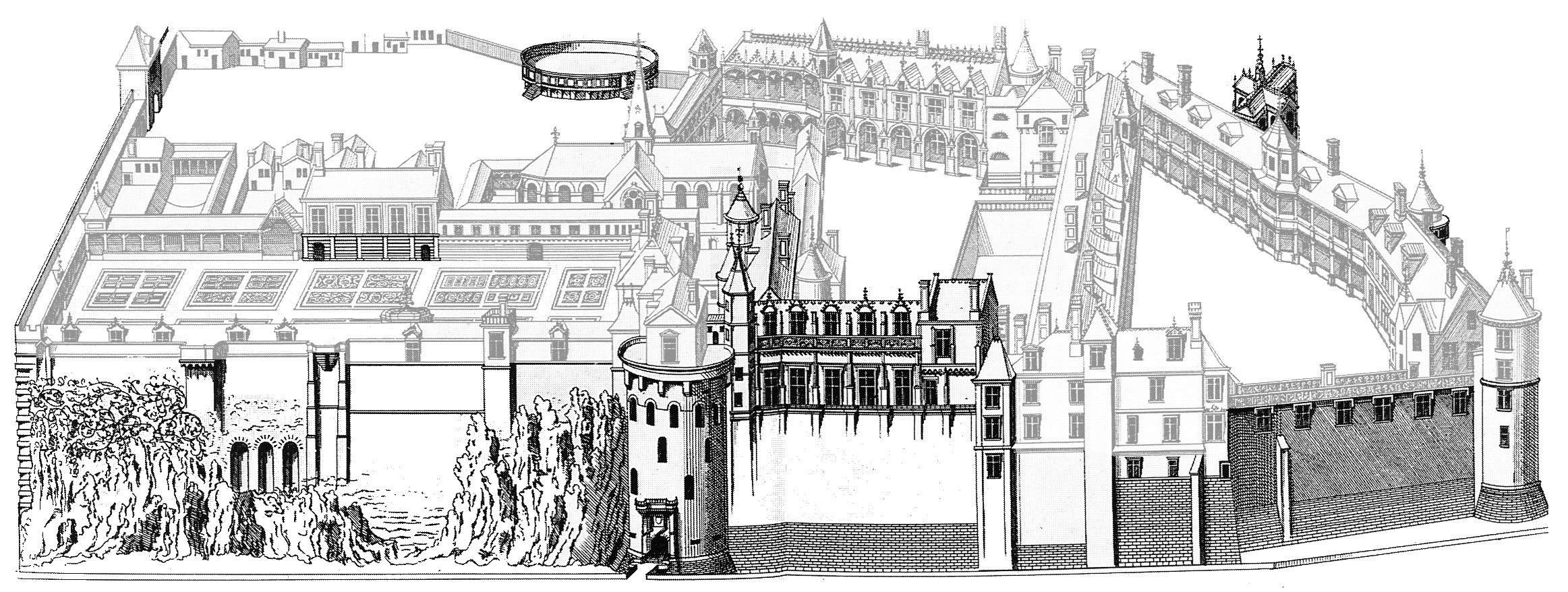 Der heutige Baubestand von Schloss Amboise auf dem Stich von Jacques Androuet du Cerceau